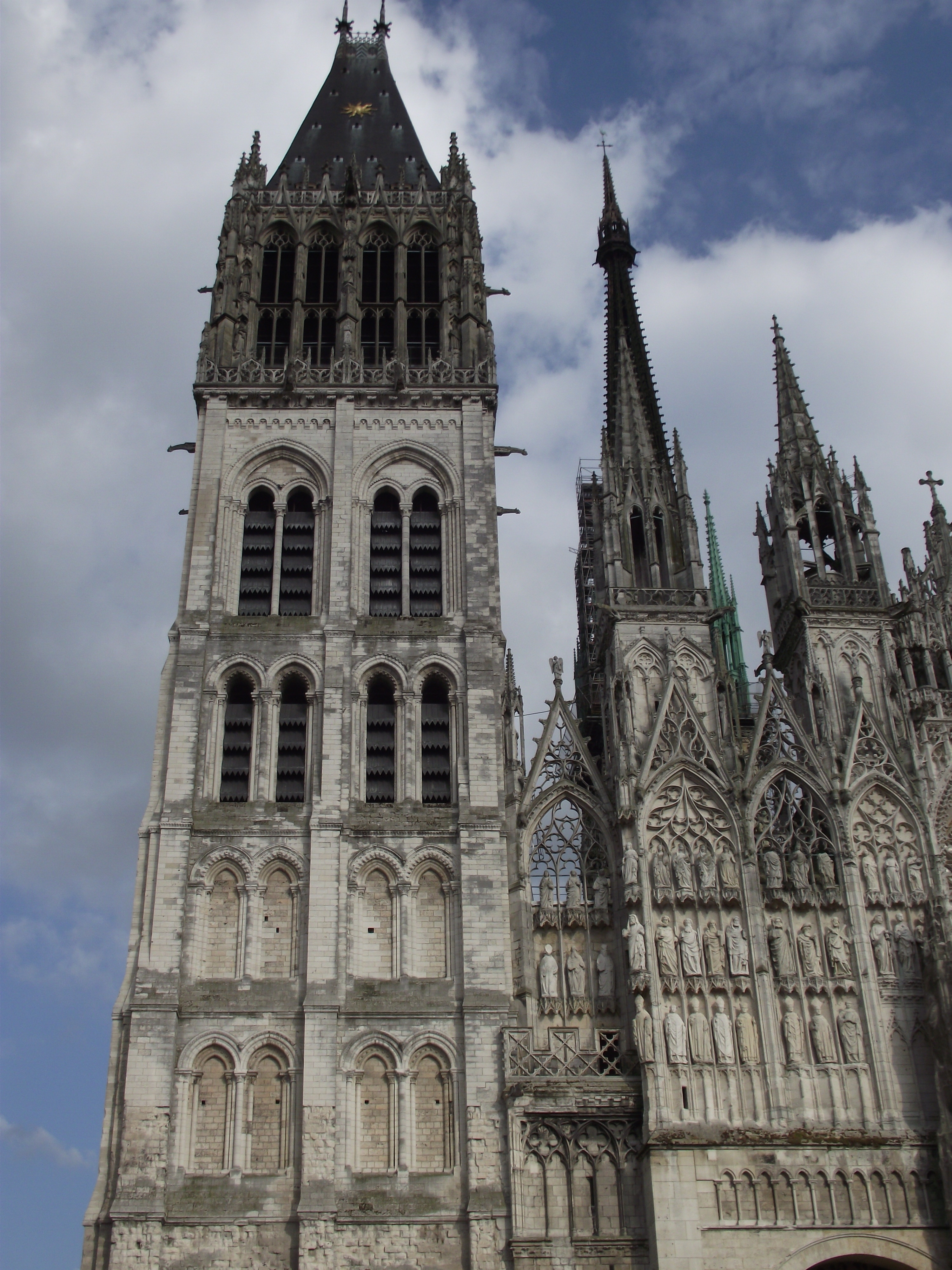 Rouen, Cathédrale Notre-Dame, Tour Saint-Romain